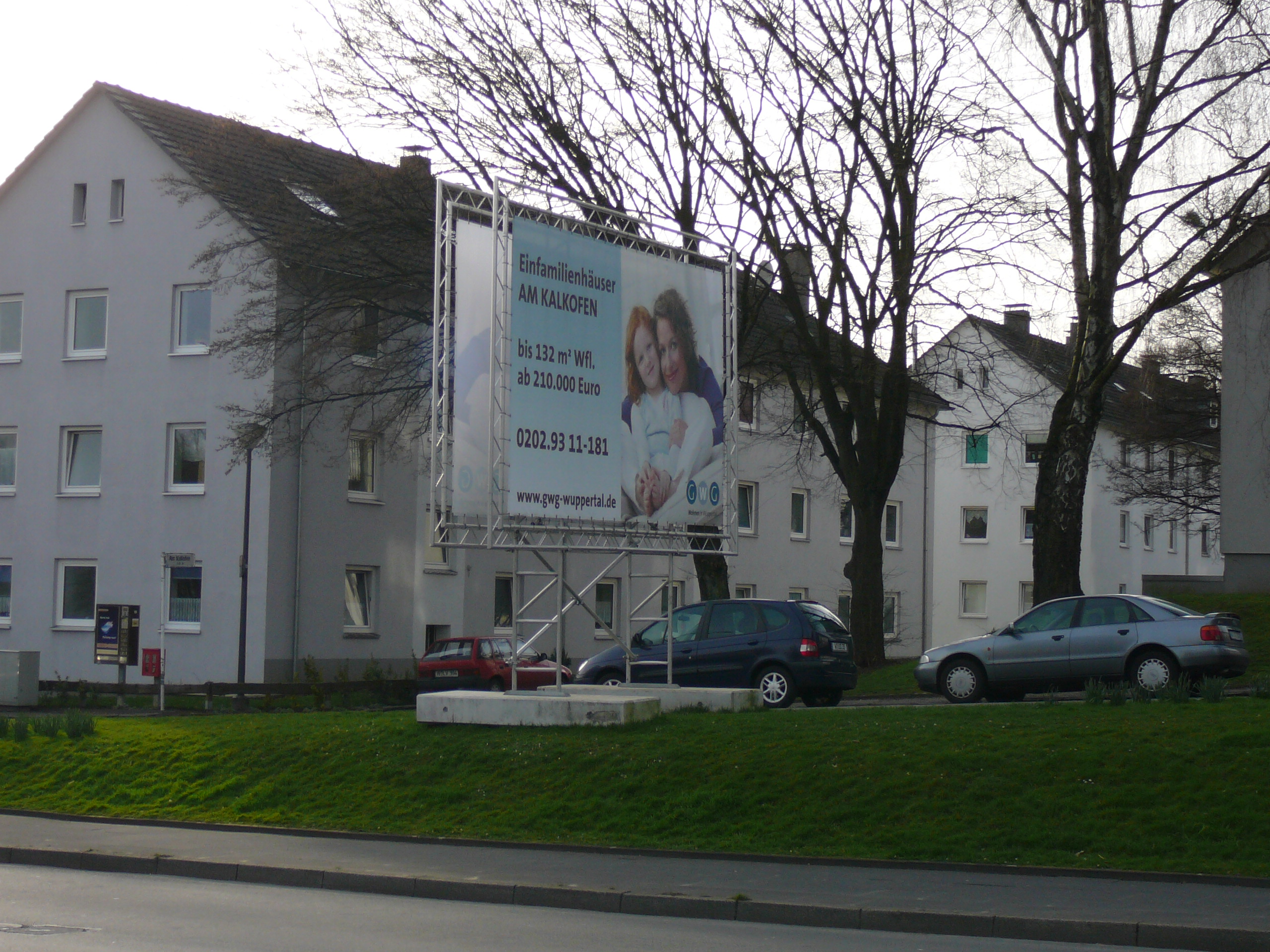 Otto-Hausmann Ring, Wuppertal